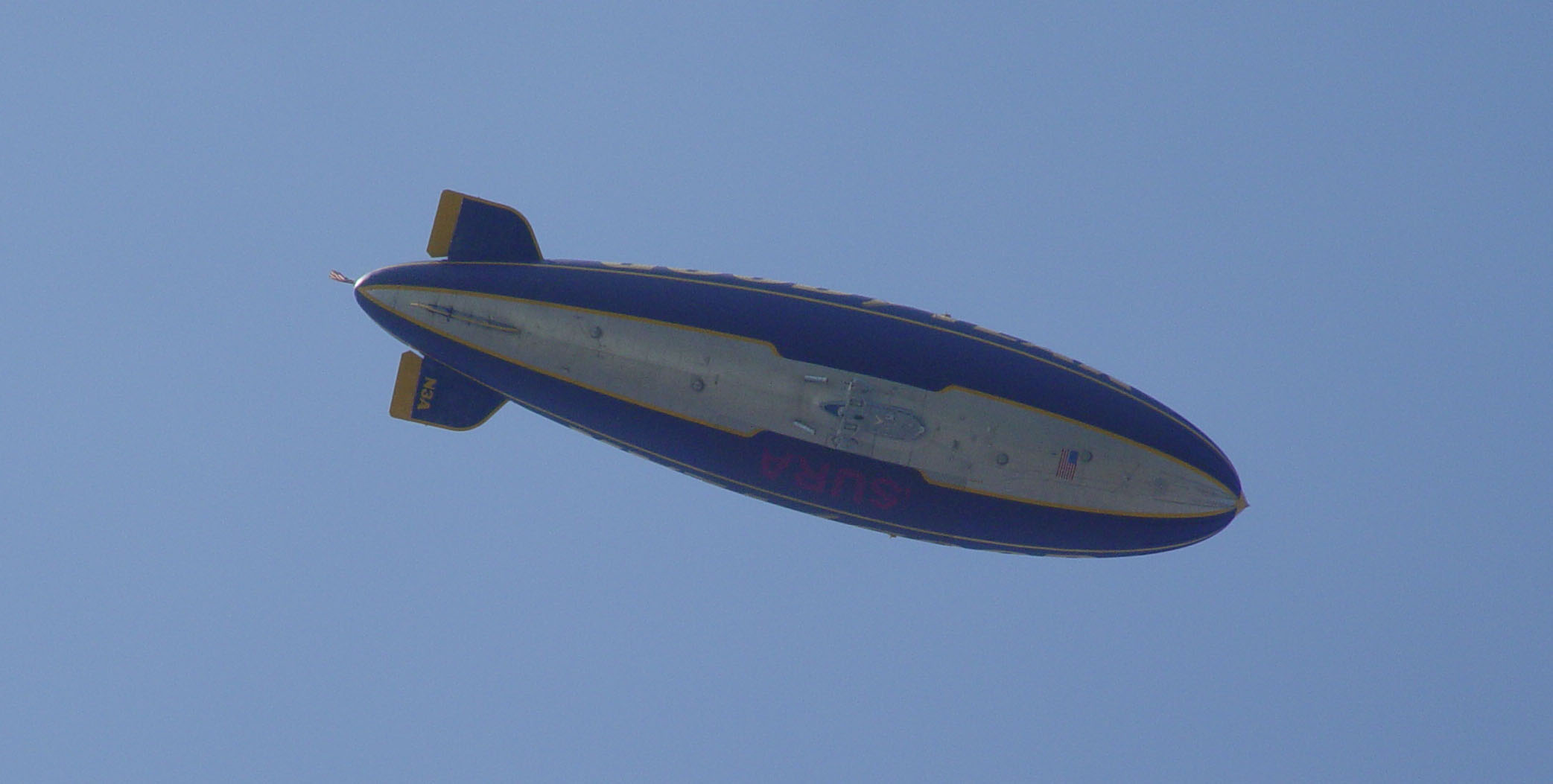 Goodyear (Luftschiff) von unten. Stars and Stripes" (N3A), Typ: GZ-20